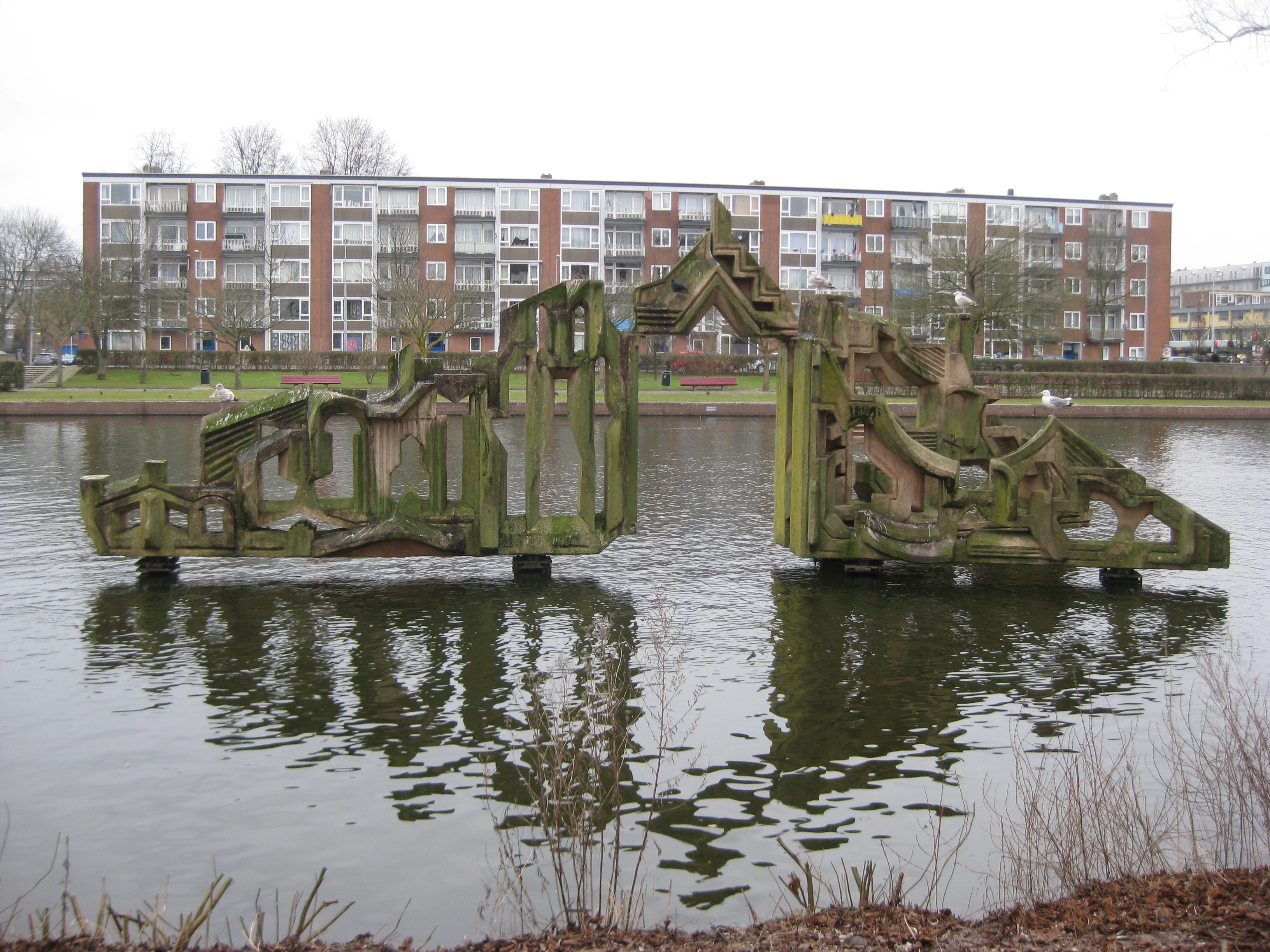 Monument voor de vrede, door Heppe de Moor, 1986, in de Hoekenesgracht, ten noorden van Tussen Meer, Amsterdam-Osdorp. Op de achtergrond de straat Hoekenes.